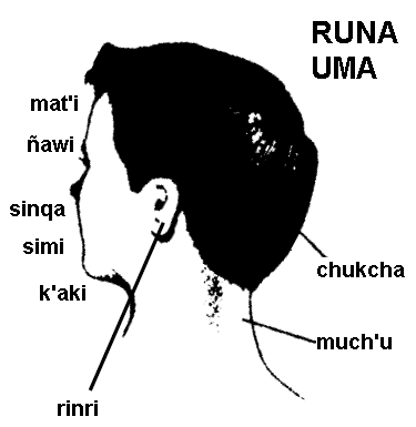 Runa Simi: Runap uman